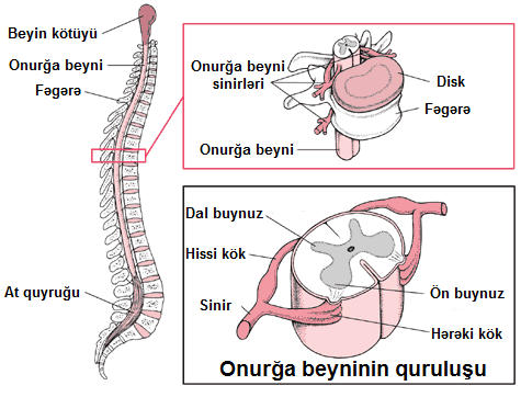 Onurğa beyninin quruluşu (sxematik)